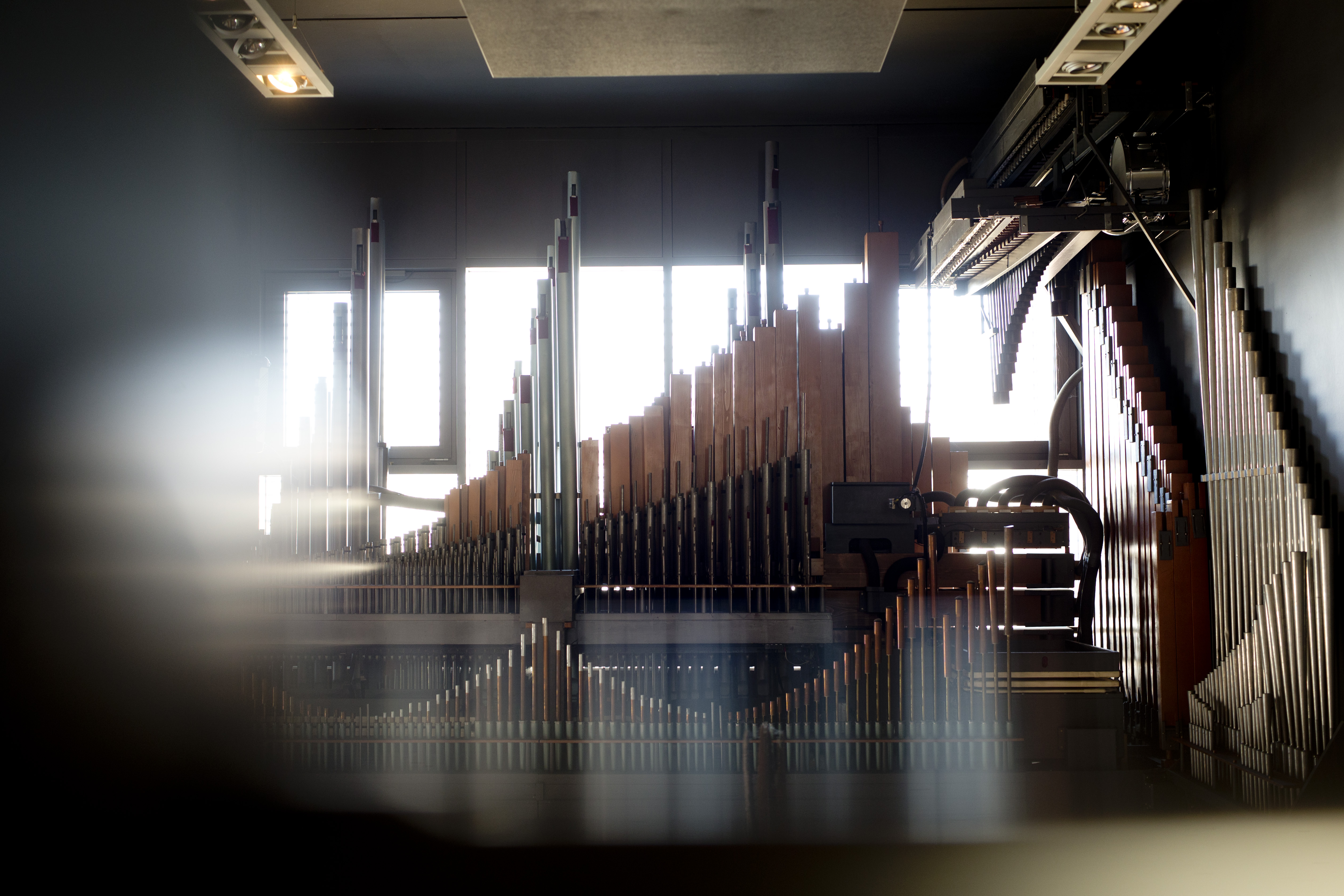 Die Orgel im Stockwerk Industriestraße